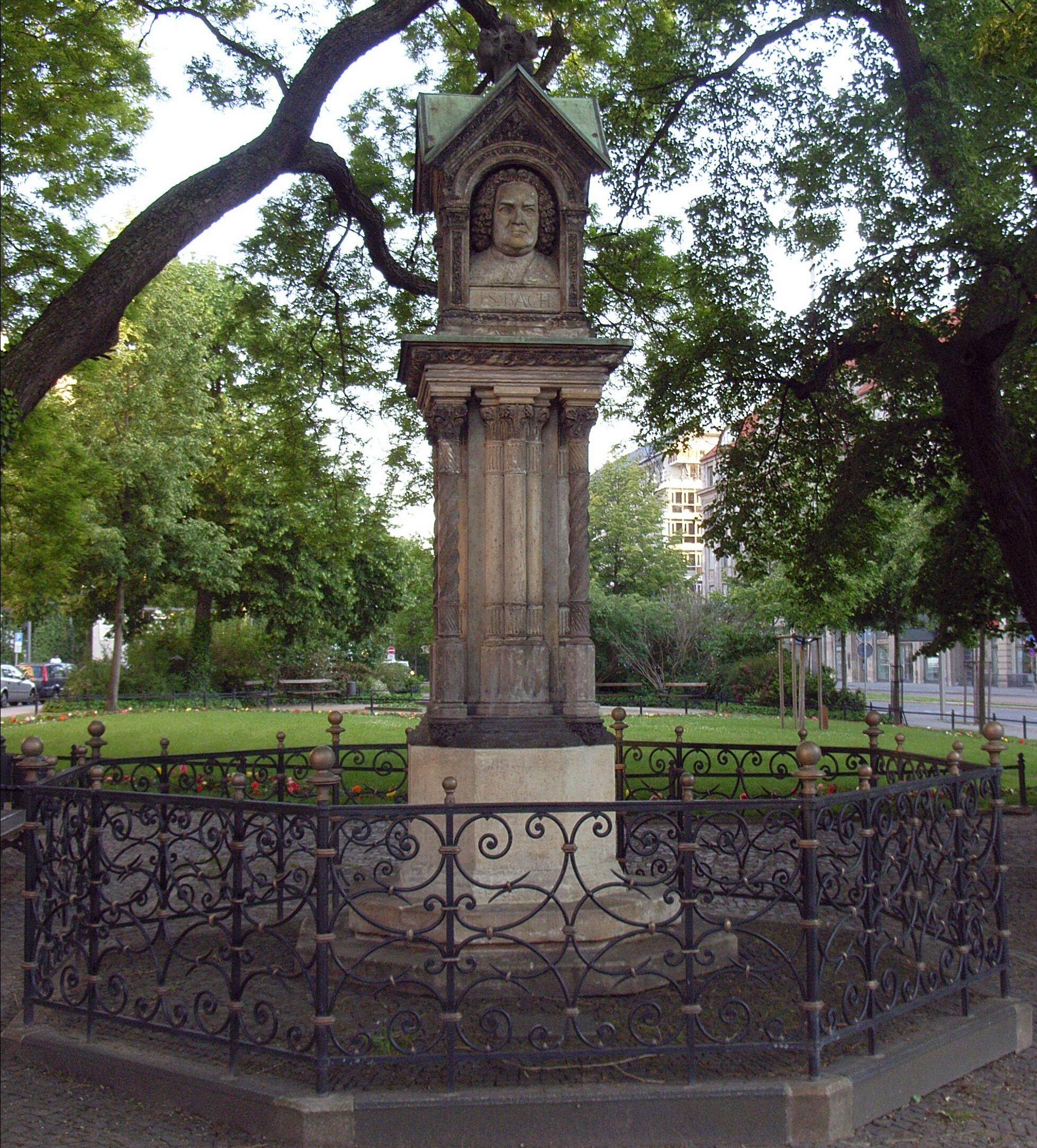 Dieses Bild zeigt das Alte Bach-Denkmal in Leipzig.